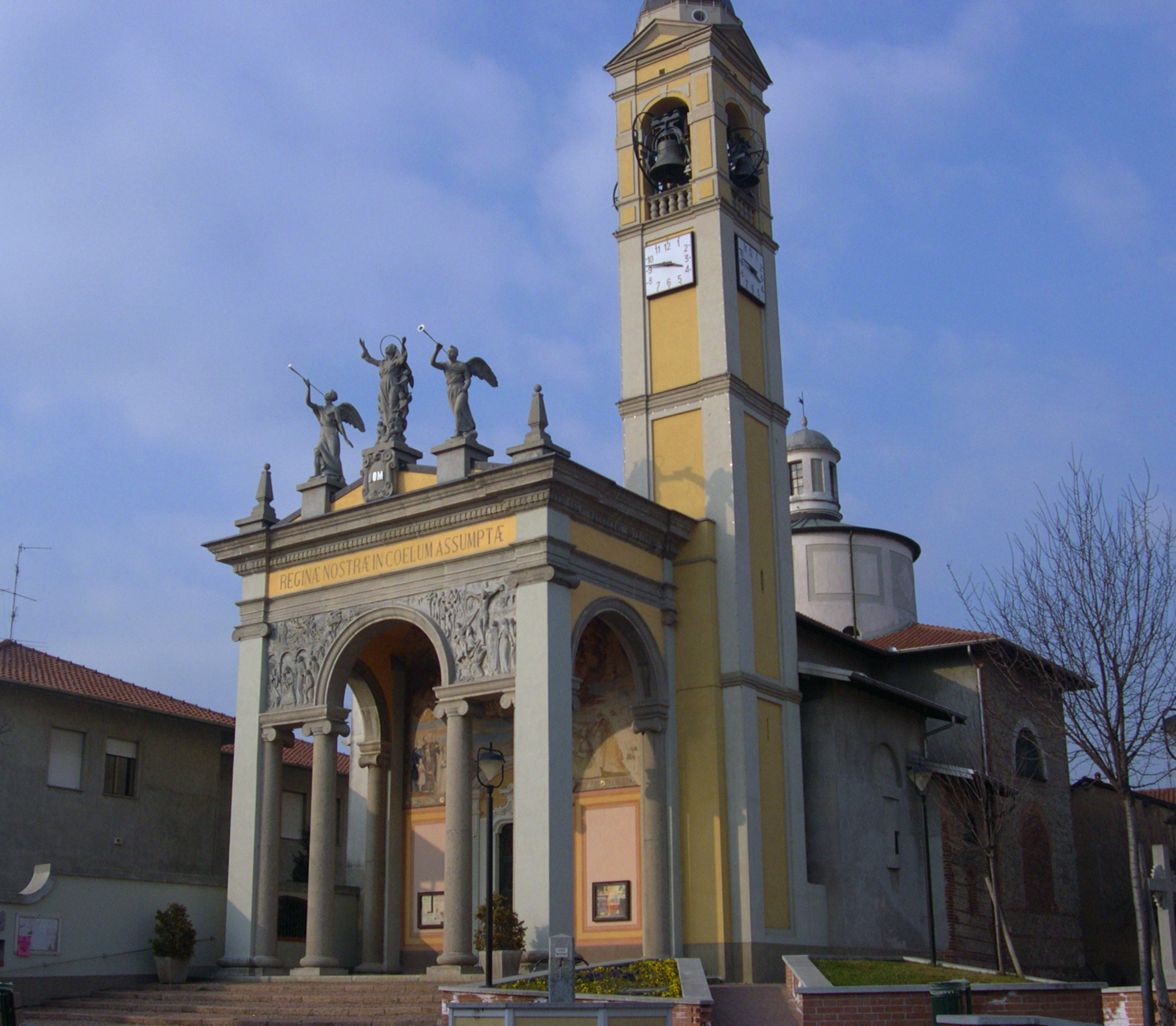 Chiesa di Santa Maria Assunta, Peveranza